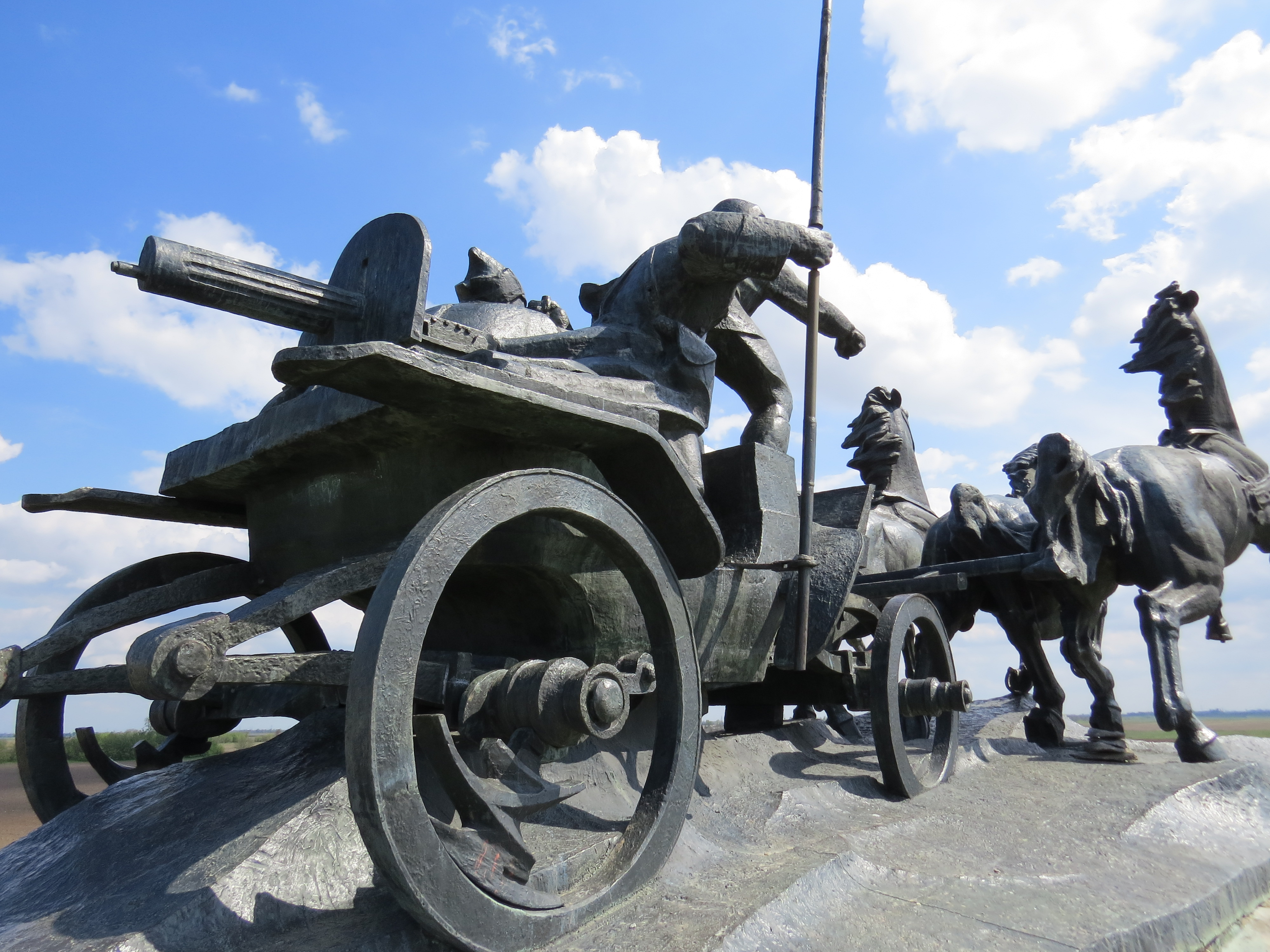 Монумент “Легендарна тачанка”, Каховка